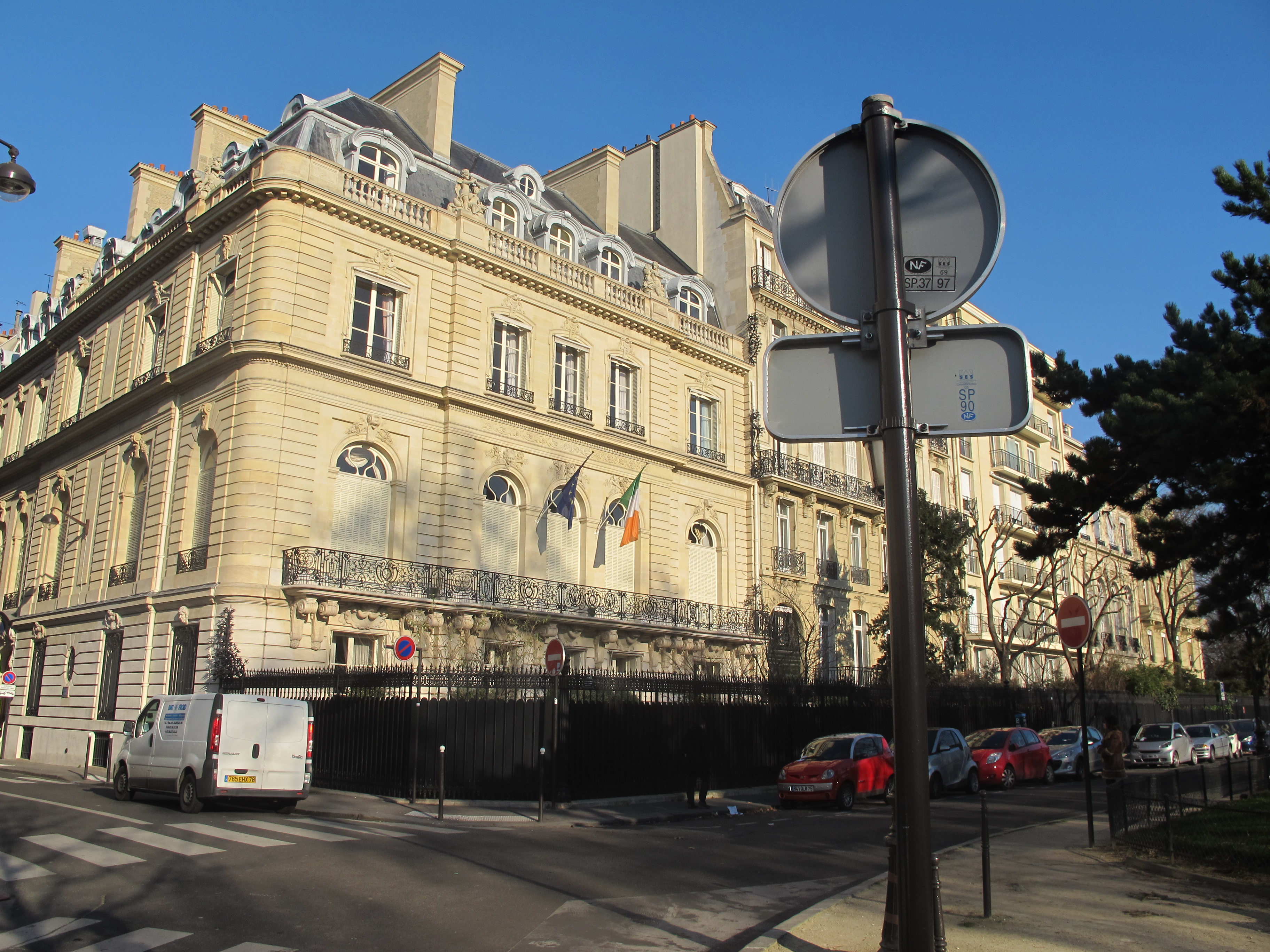 Ambassade d'Irlande en France et contre-allée.